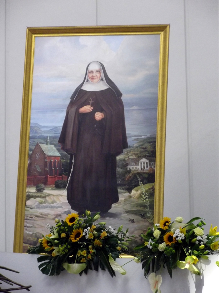 Zdjęcie zrobione podczas uroczystości beatyfikacji Zofii Czerskiej i Małgorzaty Szewczyk, w Sanktuarium Bożego Miłosierdzia w Łagiewnikach.